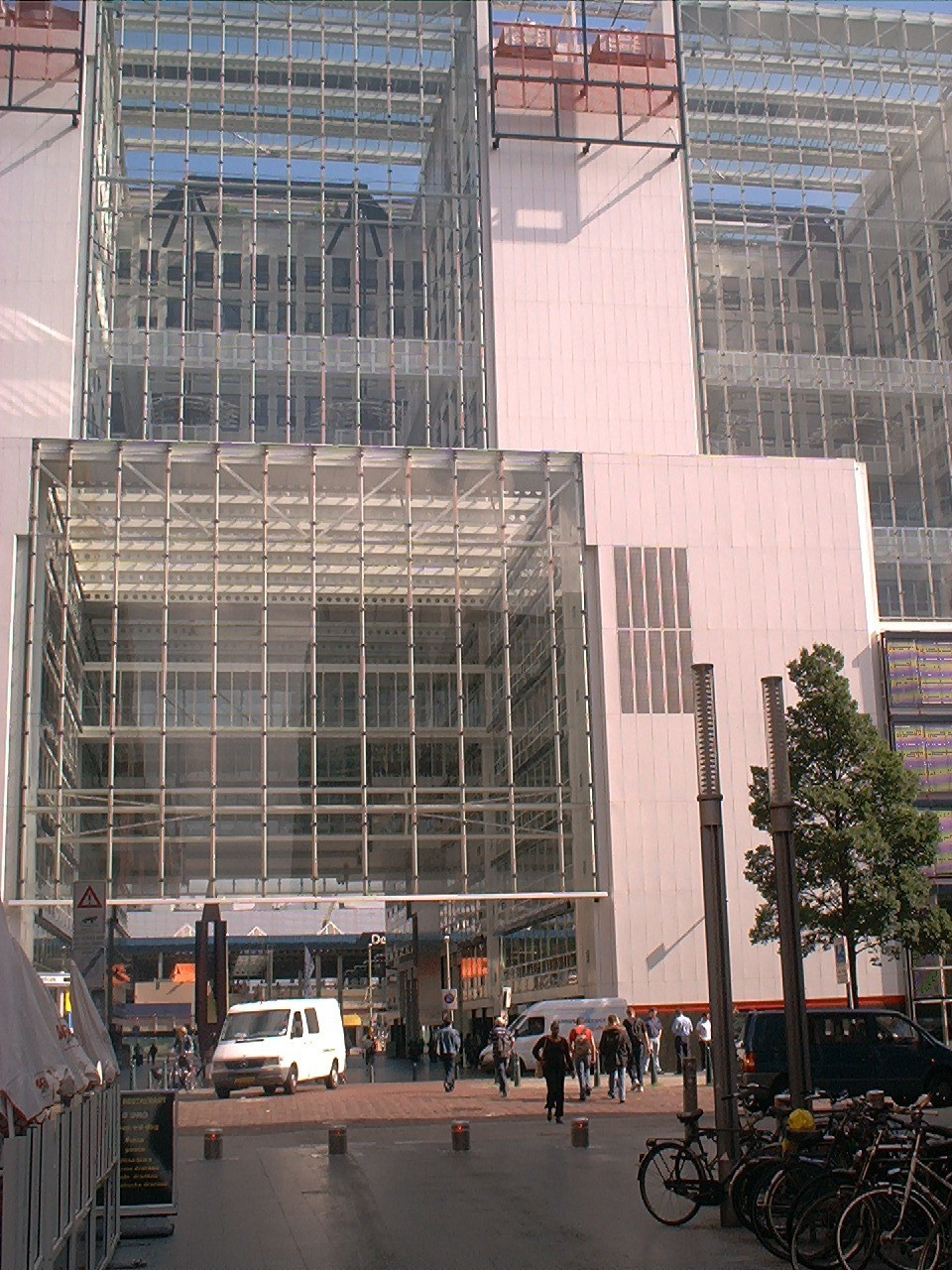 Dubbele licentie Eigen werk Foto gemaakt door Dedalus 13 september 2005 Ministerie VROM Den Haag